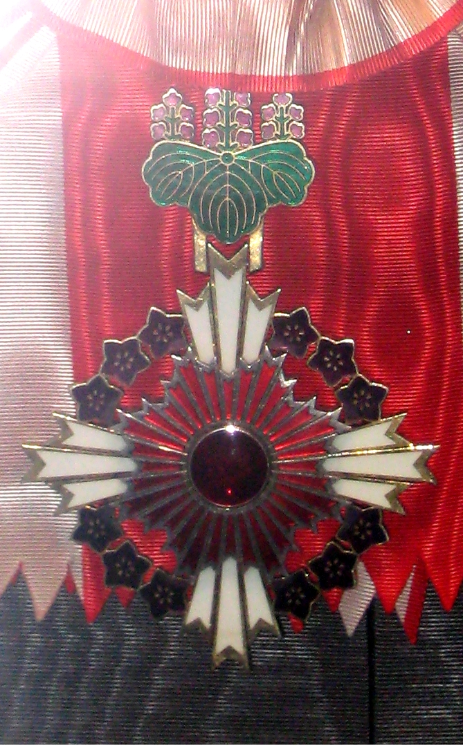 Знак ордена восходящего солнца с цветами павлонии на большой ленте. Начало 20 века.